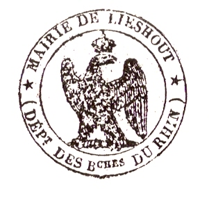 Stempel van Lieshout in de Franse tijd